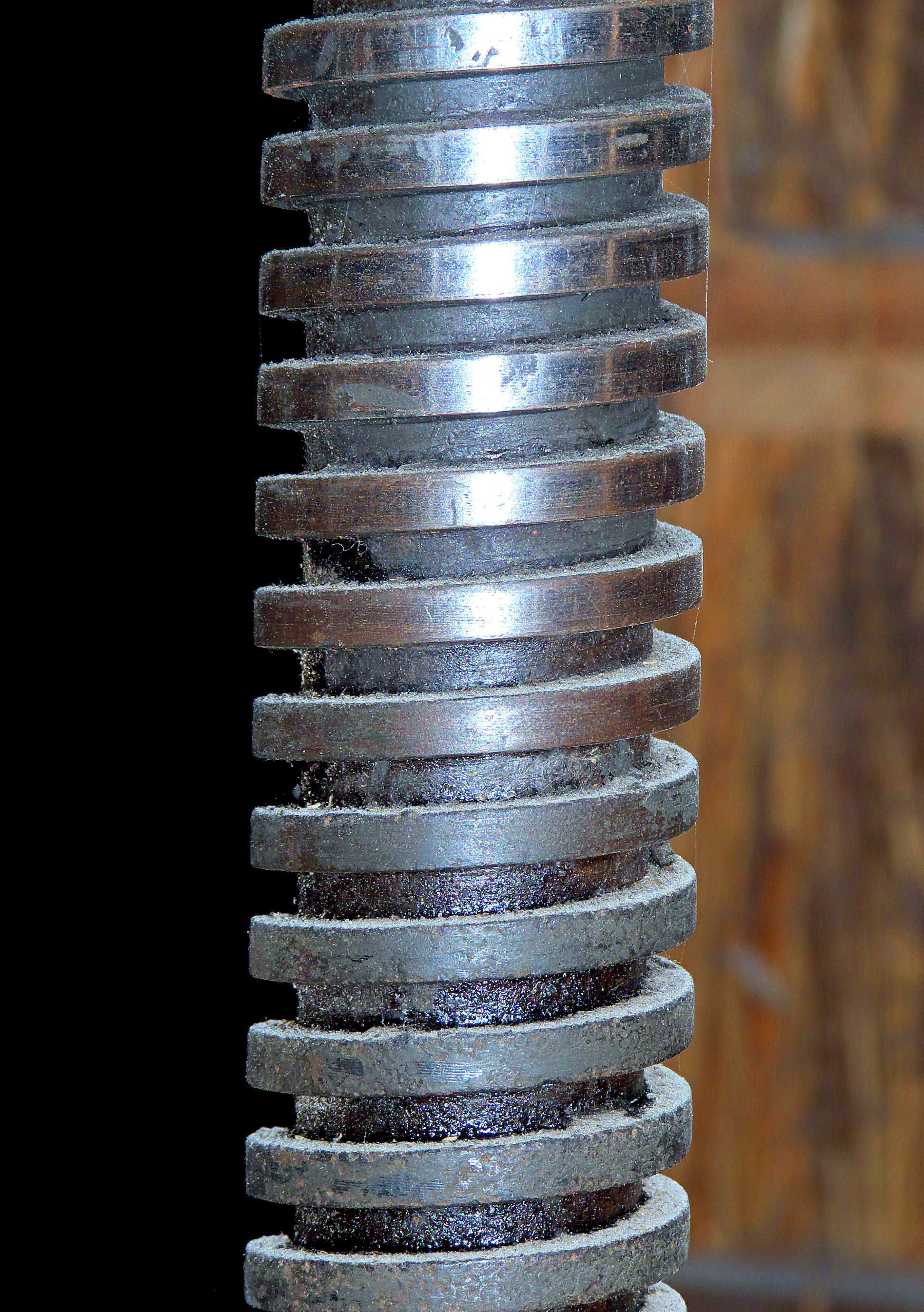 Walderveense molen, spindel steenkraan met vierkante draad